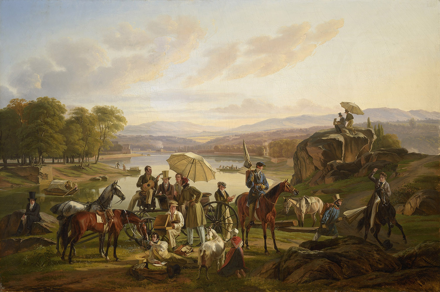 de gauche à droite : Legendre-Héral (assis et coiffé d'un haut-de-forme), Augustin Thierrat (couché et dessinant un cheval), Jean Marie Jacomin (avec sa boite de couleur sur les genoux), Fleury Richard (au fond, coiffé d'un haut-de-forme) avec à côté de lui Michel Genod en partie caché par Anthelme Trimolet (tenant un parasol), Etienne Rey derrière la roue, à côté Jean-Claude Bonnefond à cheval, et plus à droite à cheval aussi Reverchon. Antoine Duclaux est en haut du rocher en train de peindre.